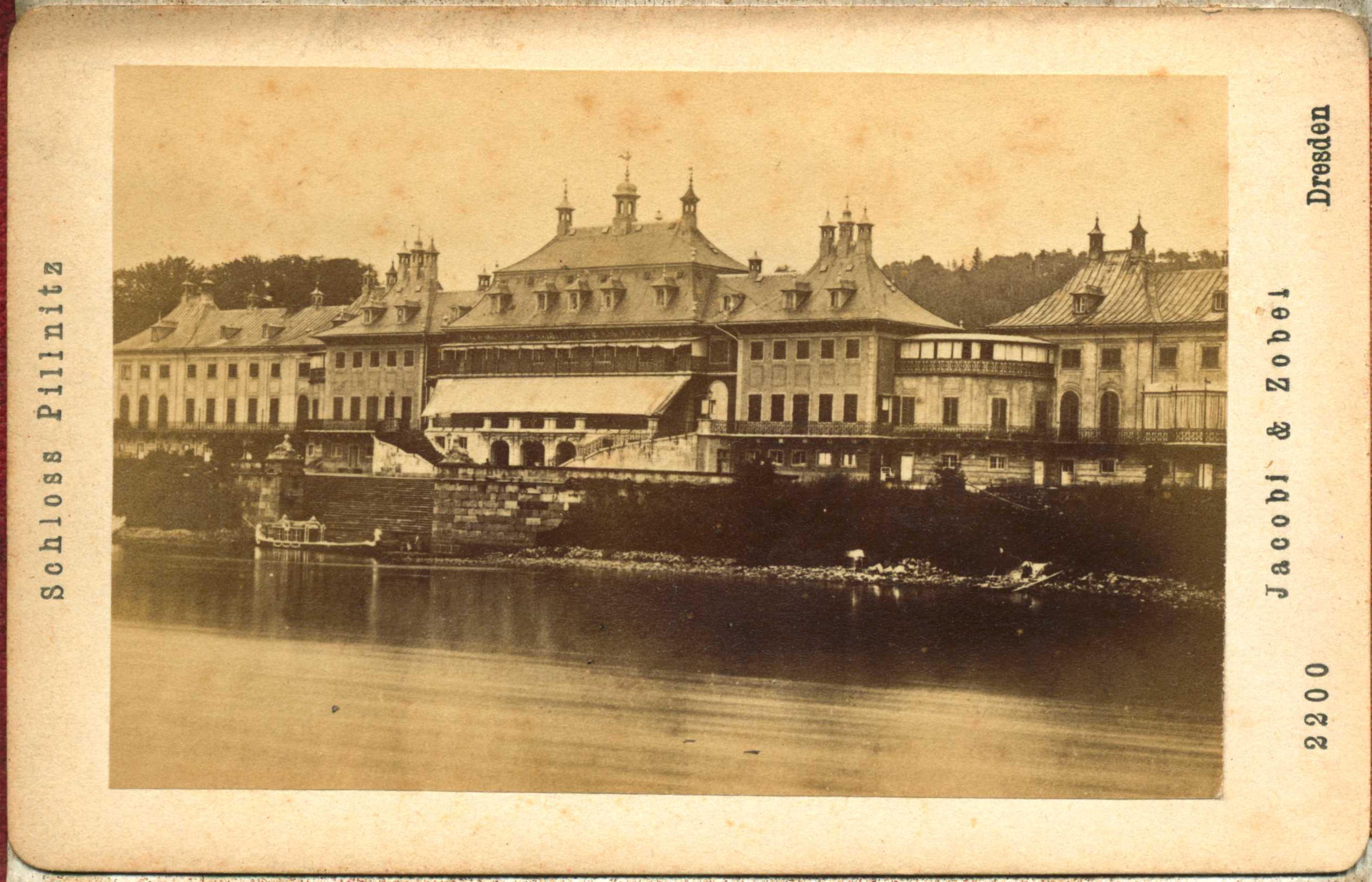 Schloss PillnitzLeporello: Bild 1, Bild 2, Bild 3, Bild 4, Bild 5, Bild 6, Bild 7, Bild 8, Bild 9, Bild 10, Bild 11, Bild 12